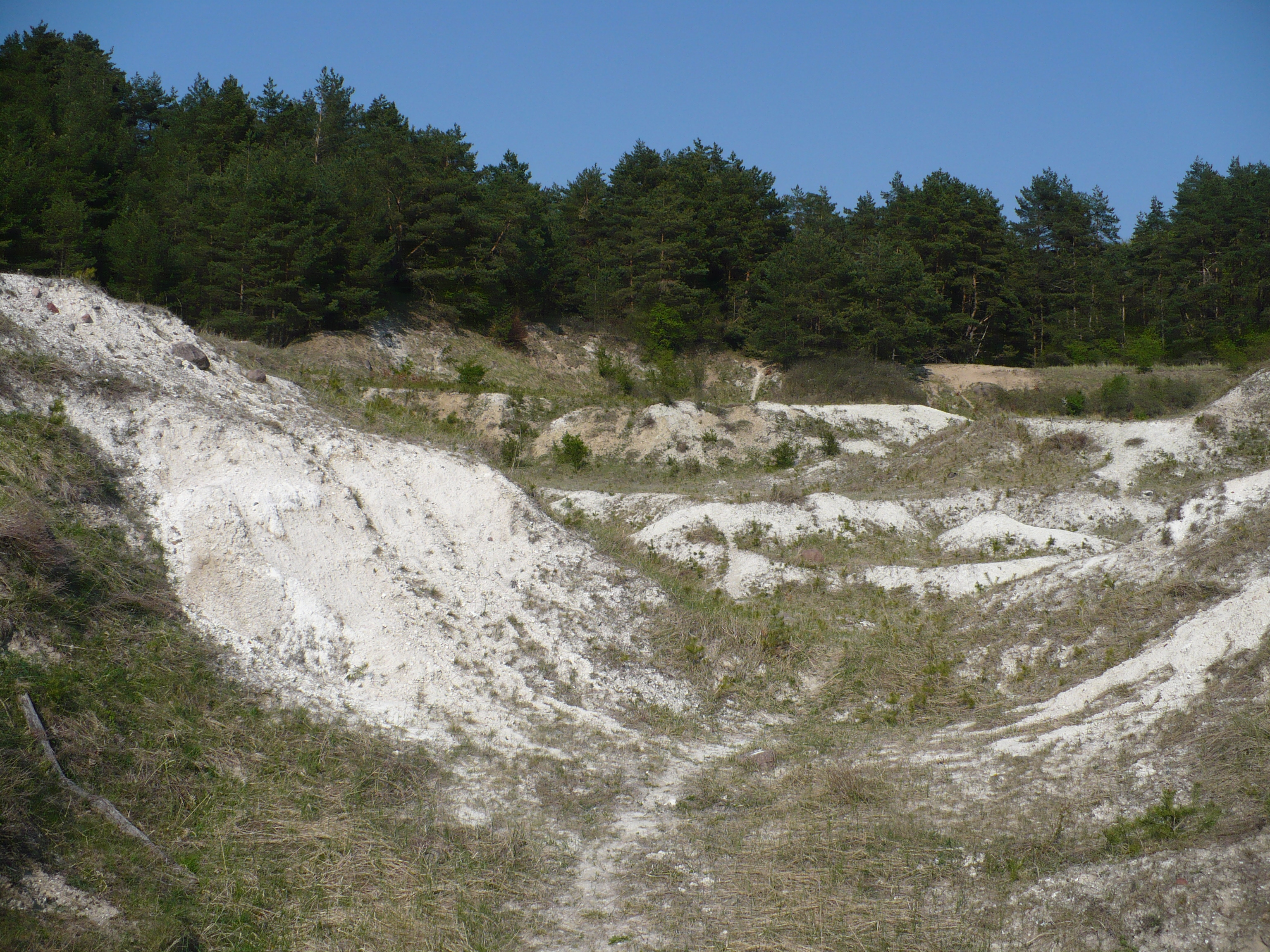 Stara Kredownia w Wicku koło Międzyzdrojów